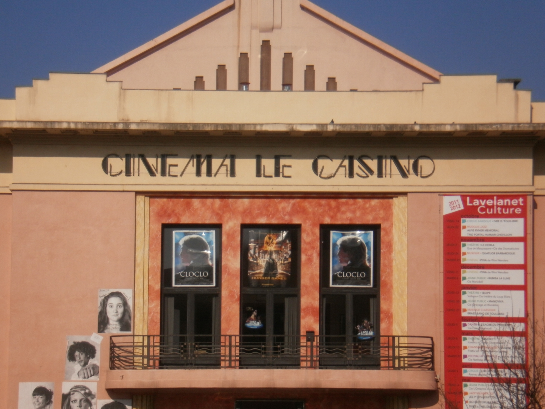 Façade sud-est du cinéma art et essai de Lavelanet (Ariège, Midi-Pyrénées, France).